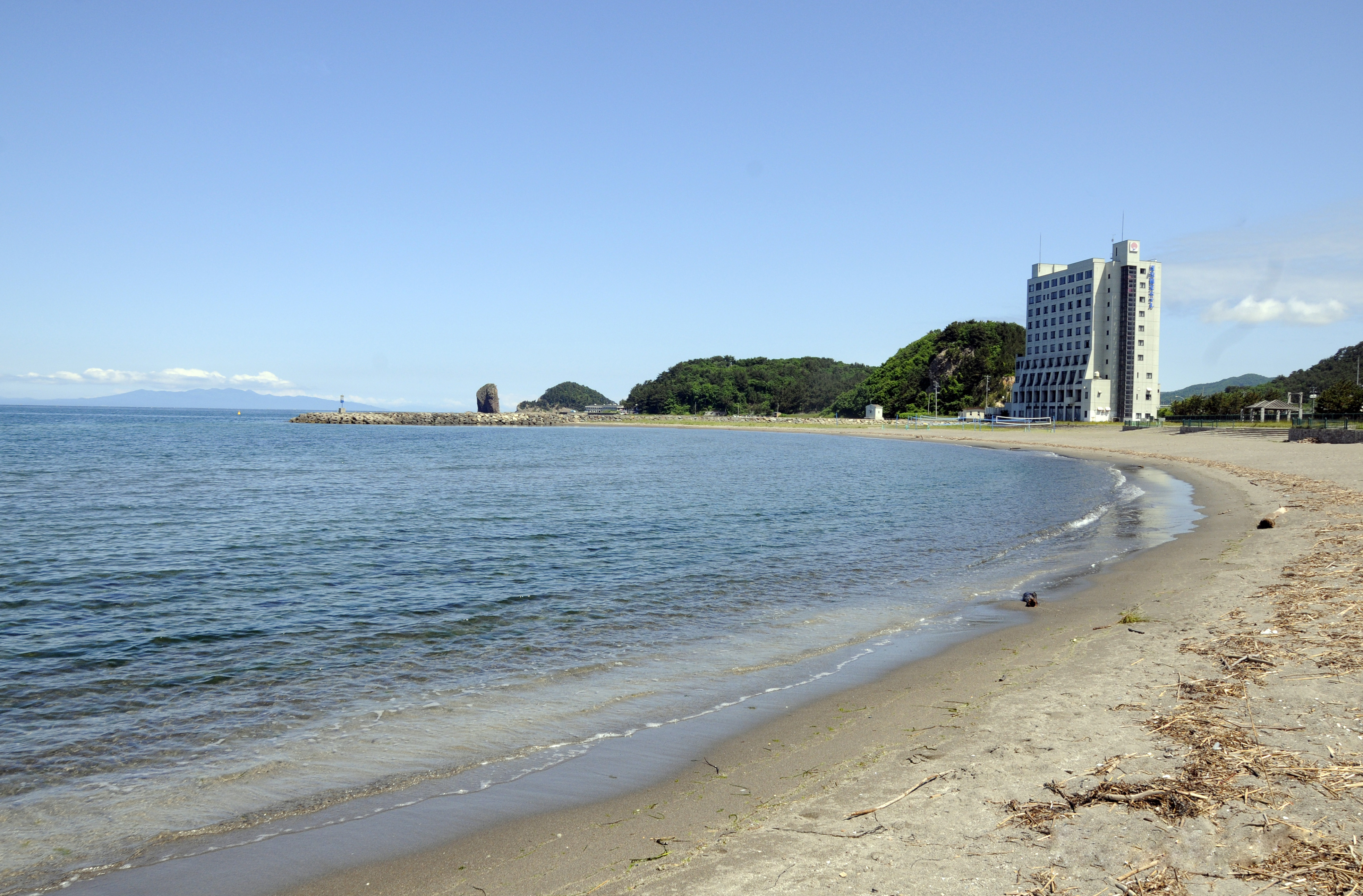 浅虫温泉の海岸。白い建物が浅虫観光ホテル。